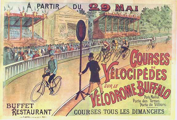 Cartaz anunciando a inauguração do Vélodrome Buffalo, velódromo localizado em Porte Maillot, Neuilly-sur-Seine em Paris.